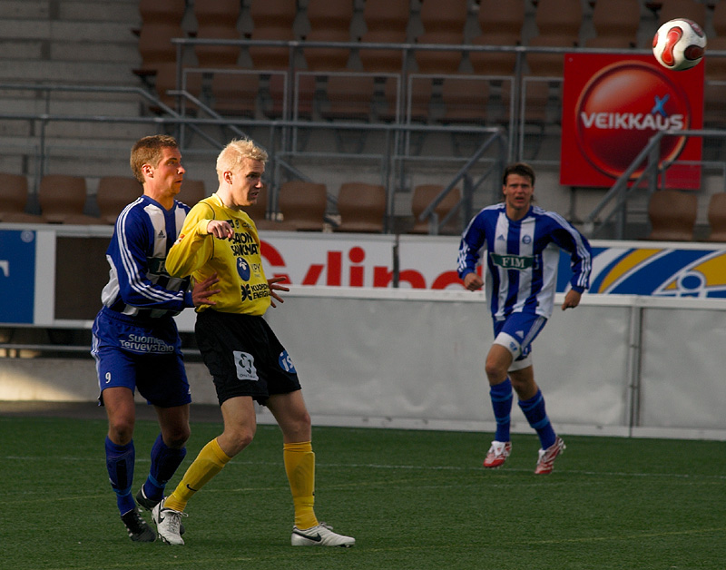 Striker Ilja Venäläinen of KuPS held by Klubi 04 defender Kalle Sormunen. Klubi 04 vs. KuPS of Kuopio at Finnair Stadium, Helsinki.